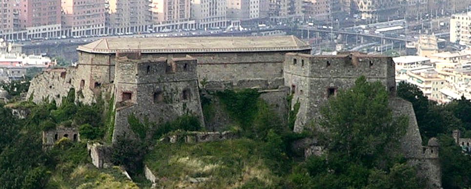 Particolare dell'image:Genova_-_Panorama_dai_Camaldoli.jpg (author Sidvics).